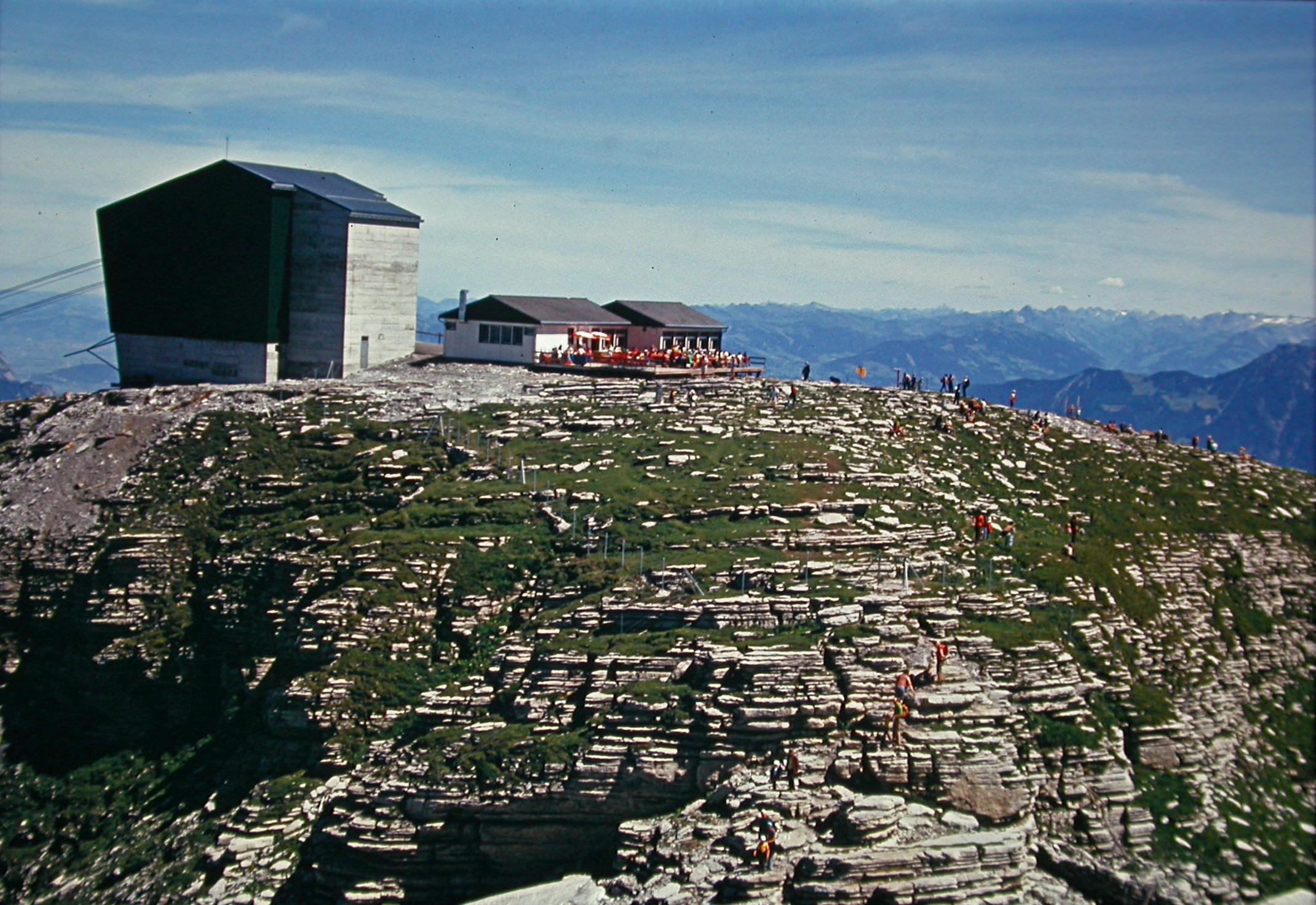 Chäserrugg am 13 August 1974